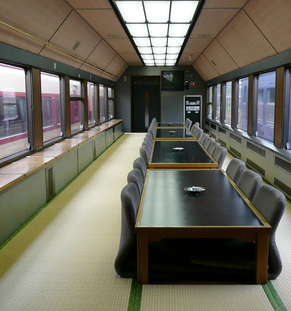 国鉄485系電車を元に改造して作られたJR東日本のお座敷列車「宴」の車内